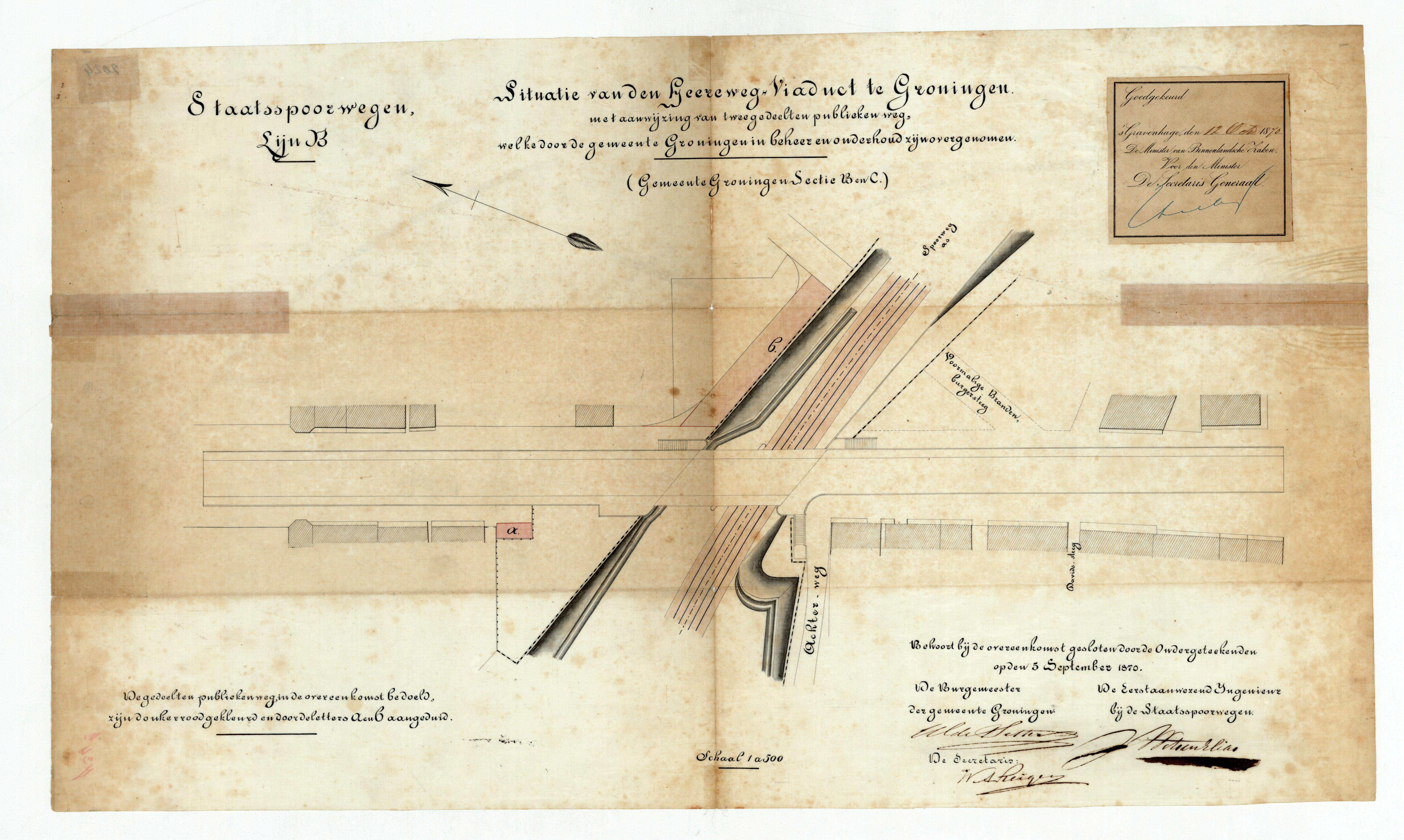 Tekening voor eerste Herewegviaduct met goedkeuring van de secretaris generaal in naam van de minister van Binnenlandse Zaken en ondertekend door de burgemeester en secretaris van Groningen en de eerstaanwezend ingenieur van de Staatsspoorwegen.